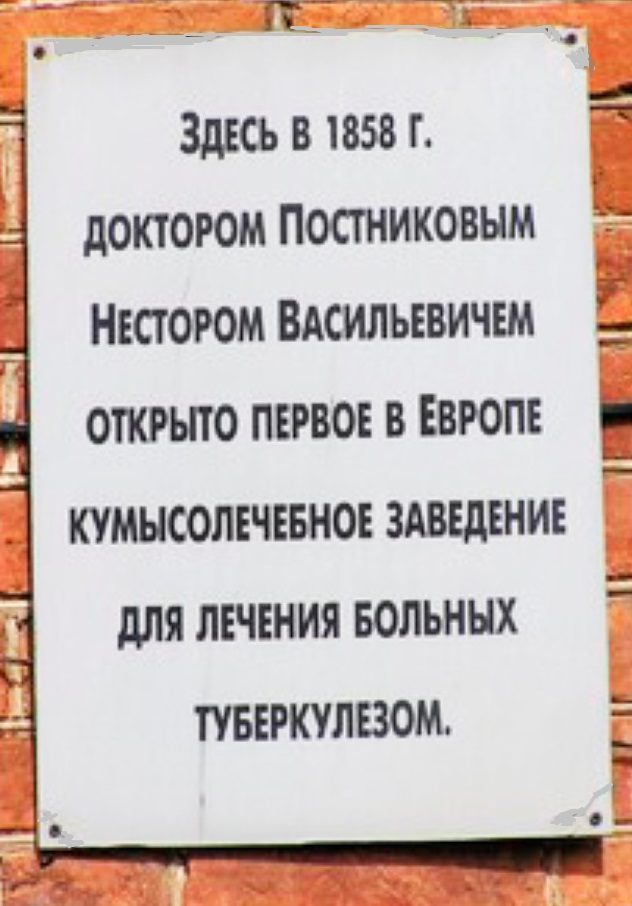 Һамар ҡалаһындағы ҡымыҙ шифаханаһындағы иҫтәлекле таҡтаташ.